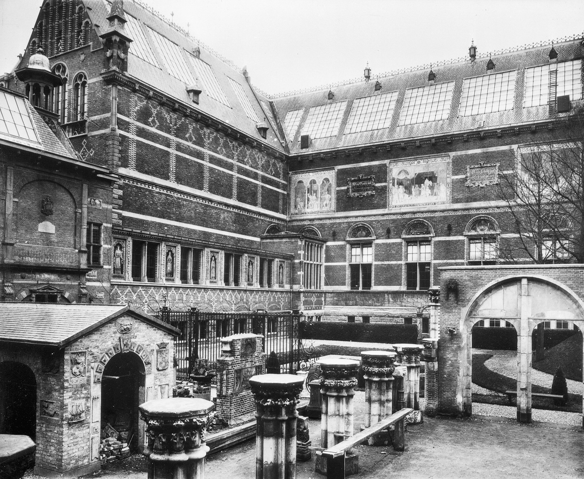 Rijksmuseum: Overzicht gedeelte van de buitenzijde (opmerking: Reproductie van oude foto)